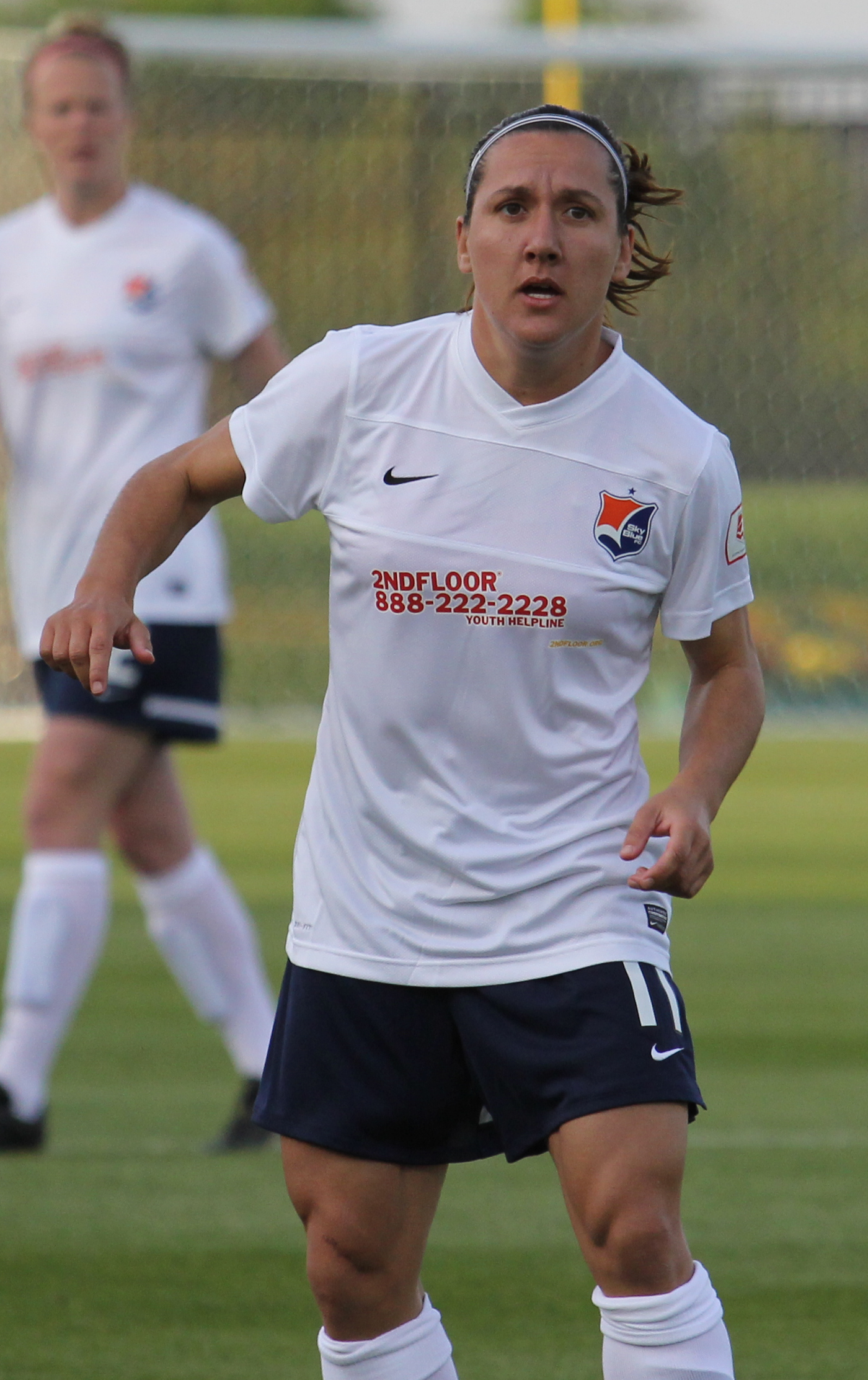 Lisa De Vanna (Sky Blue FC)